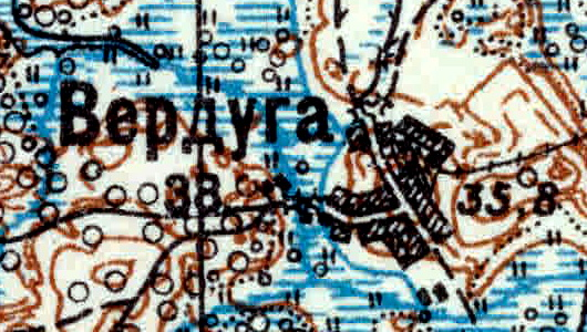 Топографическая карта Ленинградской области, квадрат VIc-27 (Залустижье), Вердуга